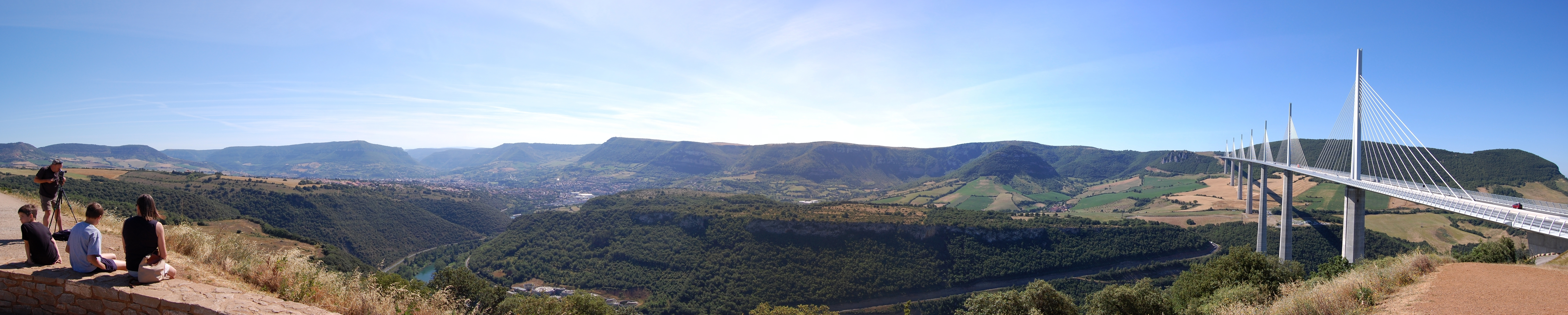 Vue panoramique du Viaduc de Millau, et de la ville du même nom. Travail personnel, sous licence CC-BY-SA-3.0. Appareil photo utilisé : Nikon D40